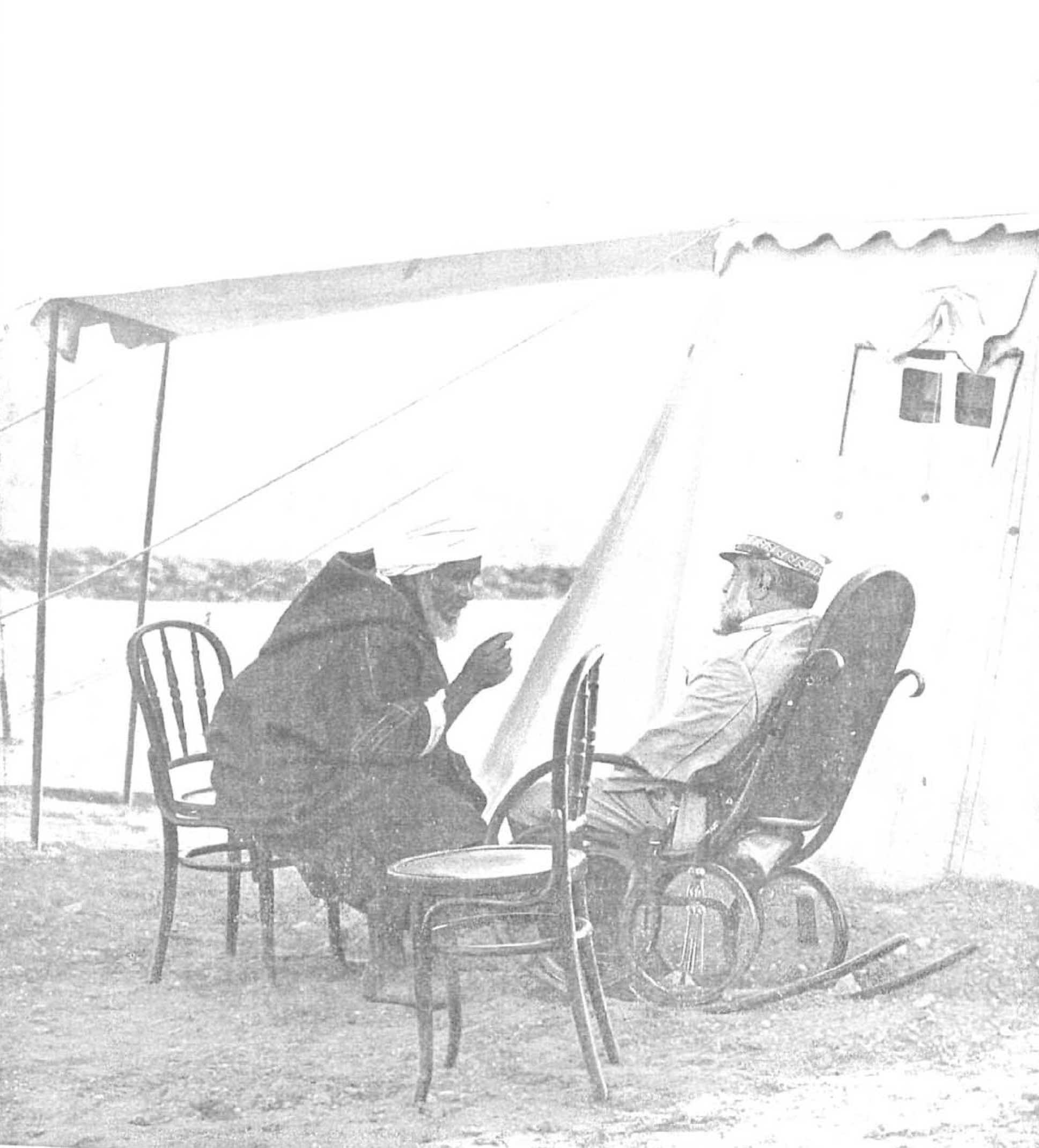 El general Marina conversando en su tienda del fuerte de Camellos.